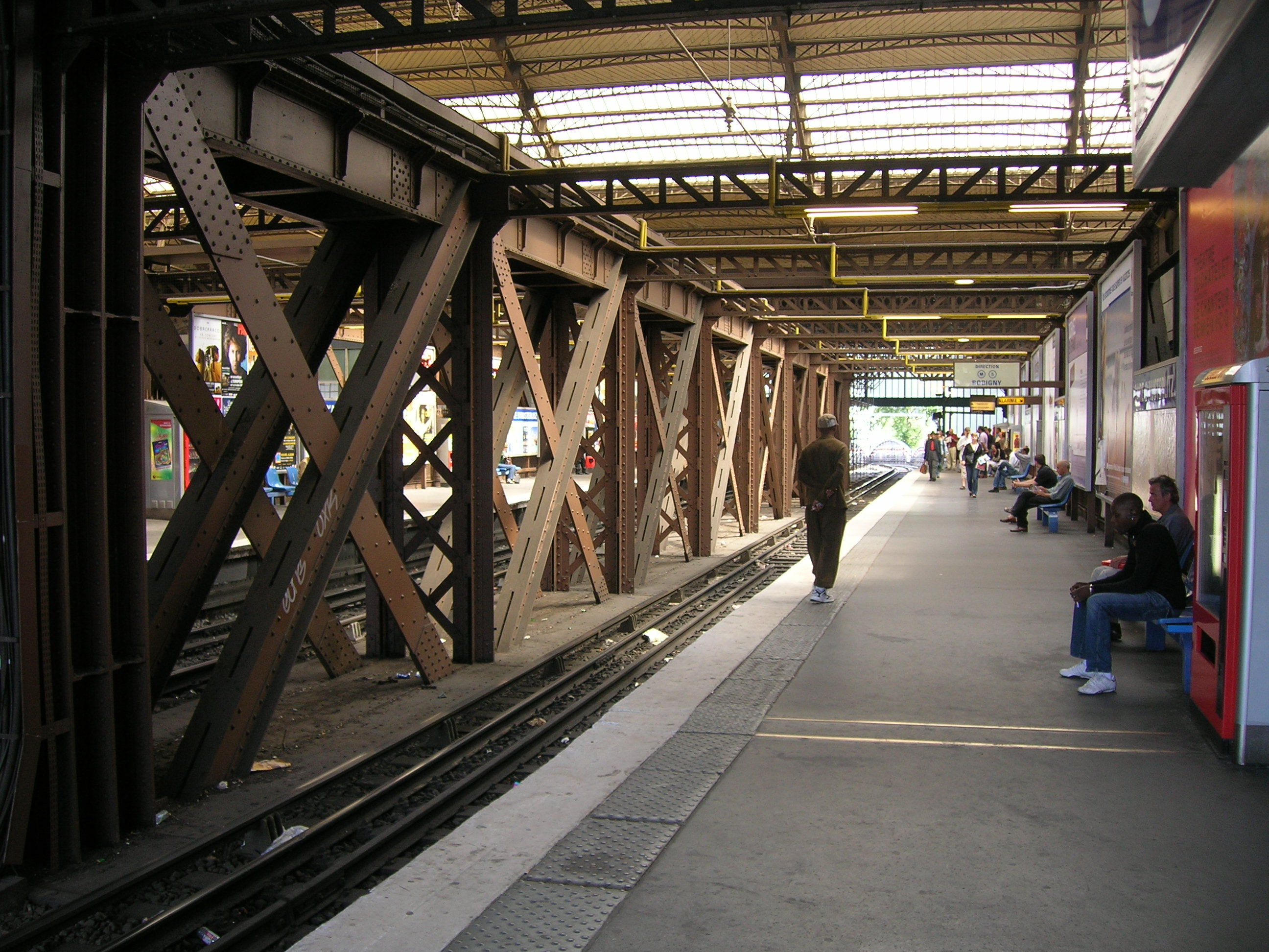 Station de métro gare d'Austerlitz ligne 5, Paris